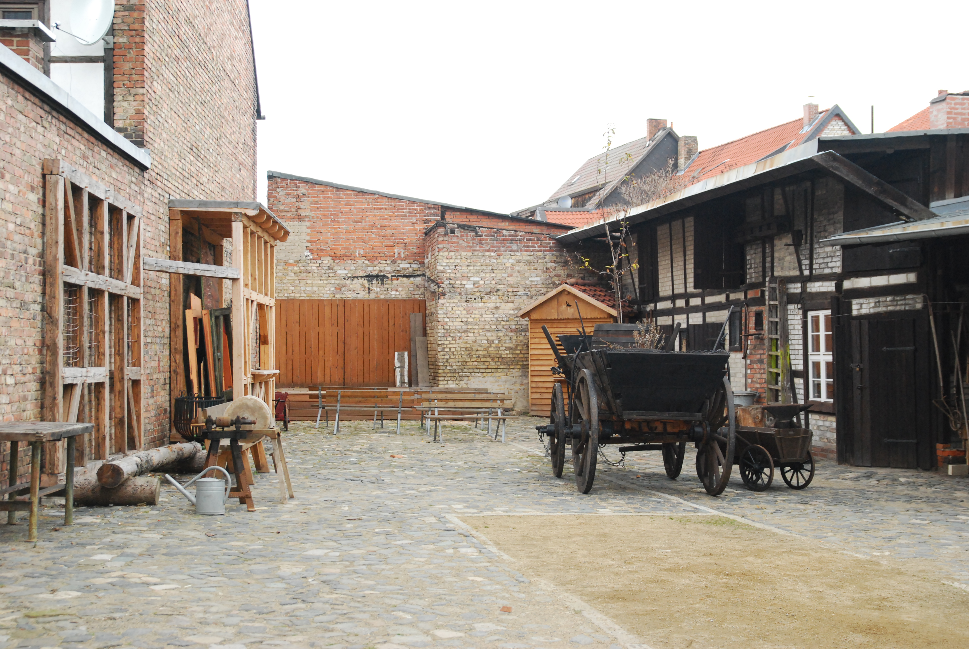 Wernigerode Altstadt